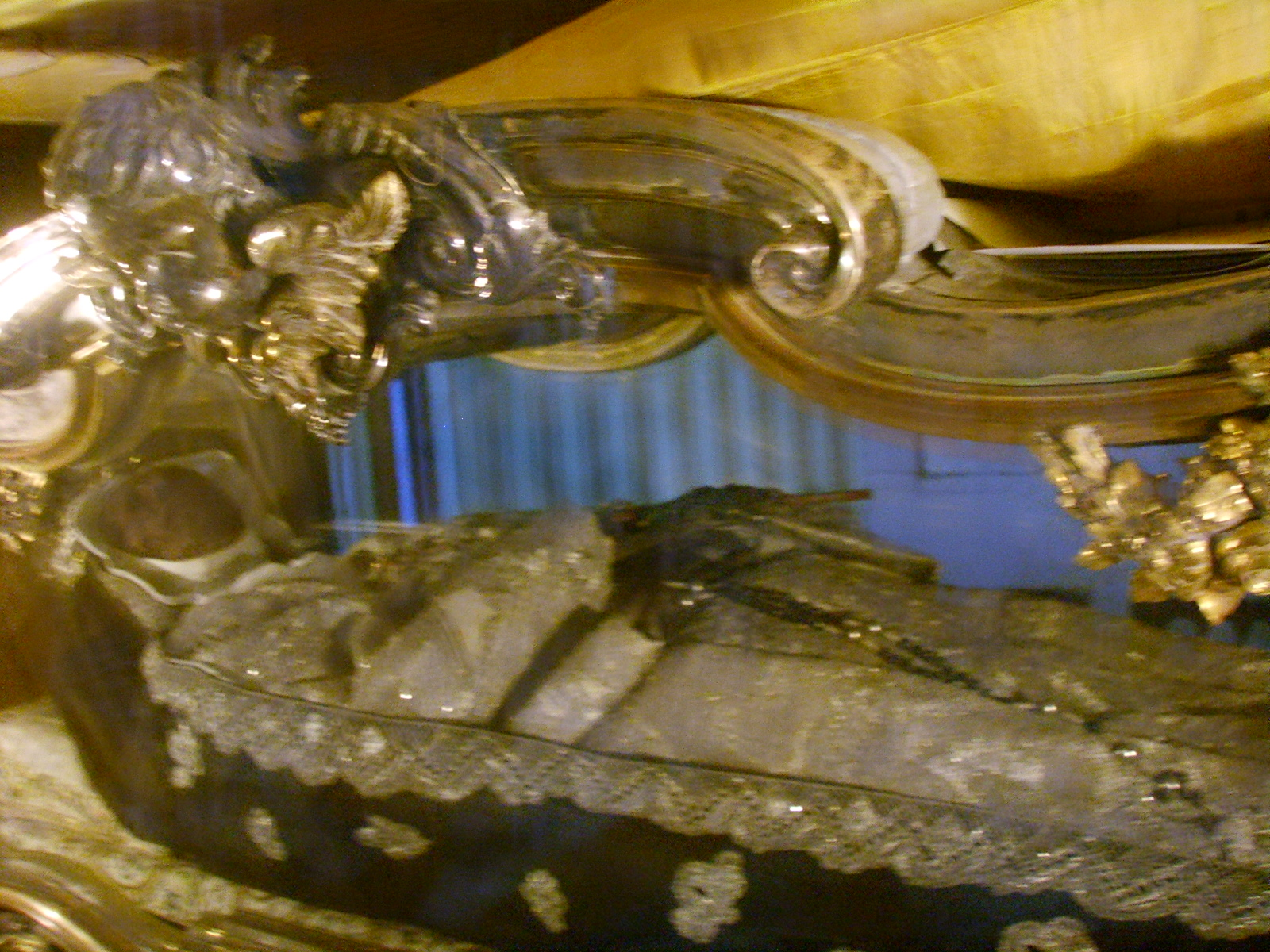 Basilica_di_Santa_Caterina_de'_Ricci inside